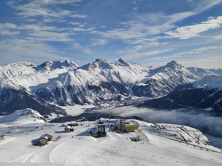 Corviglia, 2486m